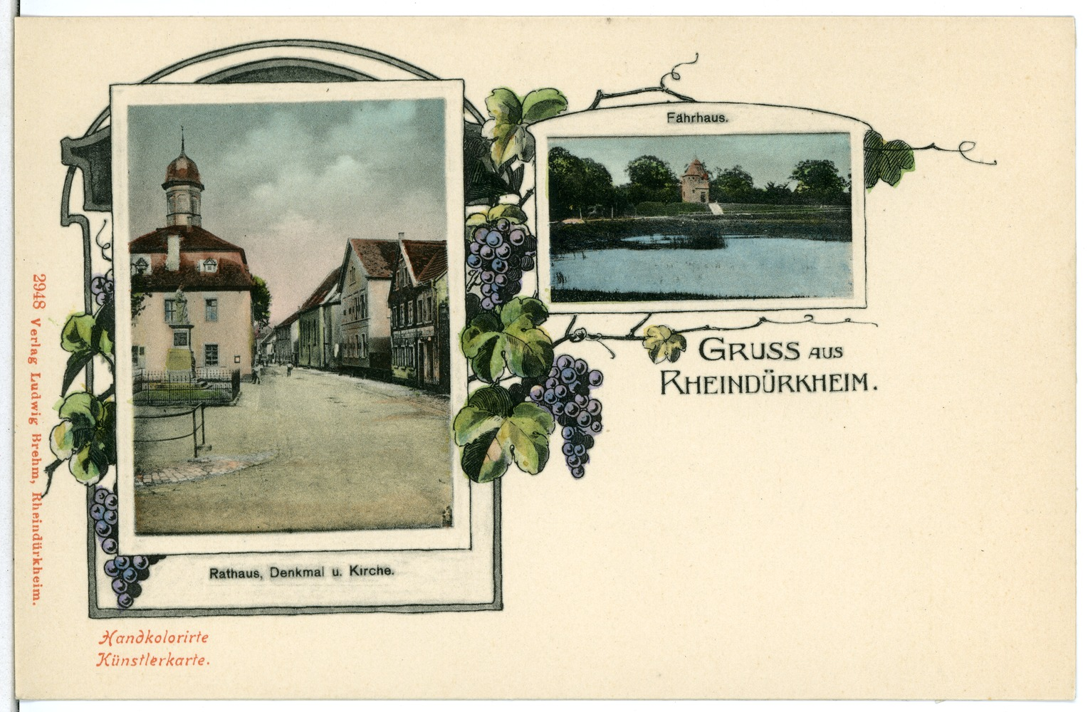 Rheindürkheim; Rathaus, Denkmal und Kirche - Fährhaus This postcard is from publisher Brück & Sohn in Meißen ( postcard has a unique number 02948 and is available in a higher resolution at the publisher. This images was uploaded in a cooperation project between Wikipedians and the publisher.